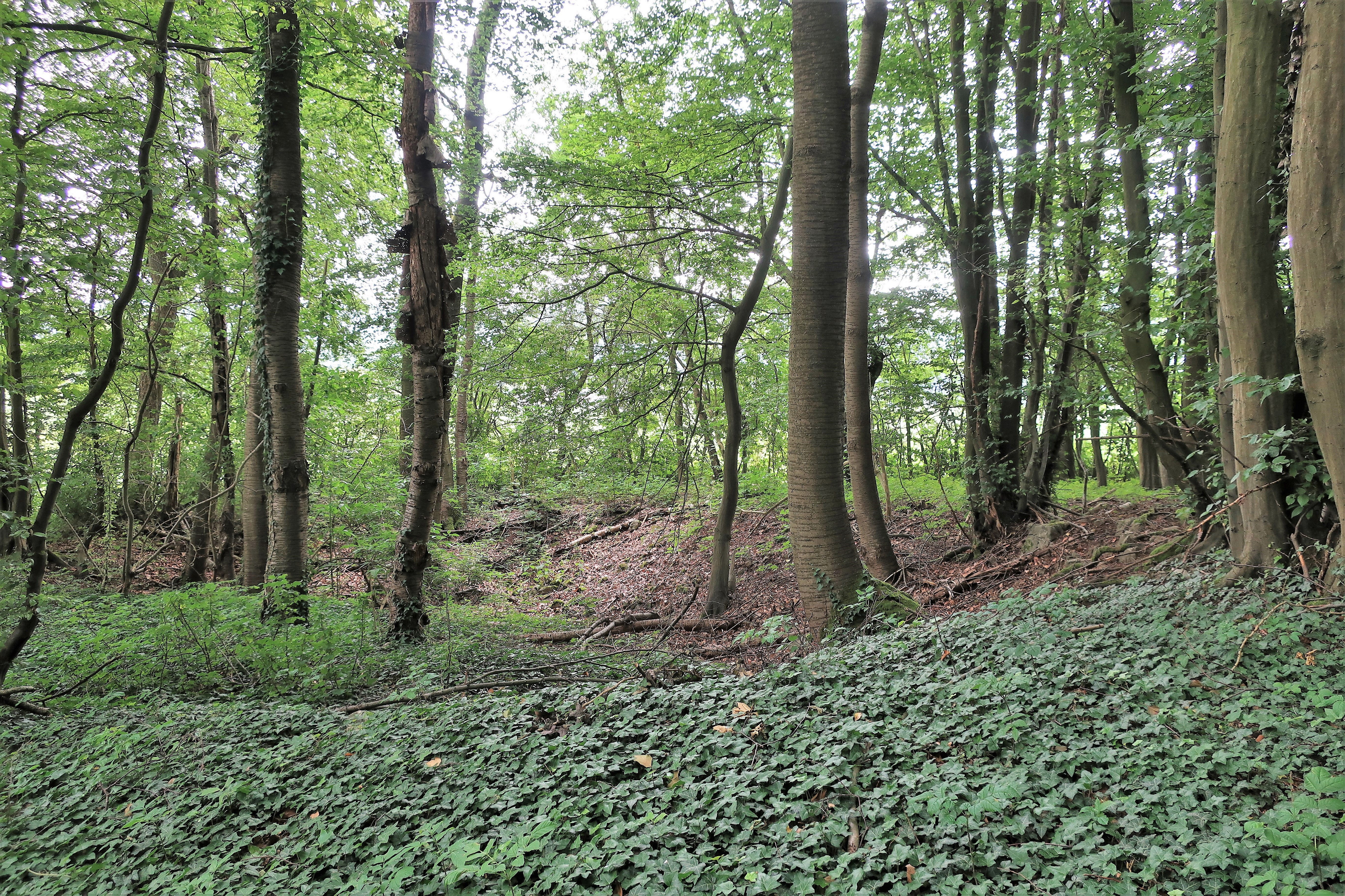 Geschützter Landschaftsbestandteil 1.4.2.61 „Waldstück mit Doline Bredde“ in Hagen, südwestlich von Holthausen. Der Bereich liegt inmitten einer landwirtschaftlich genutzten Fläche (Wiese und´Acker). Es handelt sich um einen ehemals als Niederwald bewirtschafteten Laubwaldbestand mit Lesesteinhaufen und viel Totholz. Am südöstlichen Ende schließt eine Doline über Massenkalk des Oberen Mitteldevons an, die verfüllt wurde.